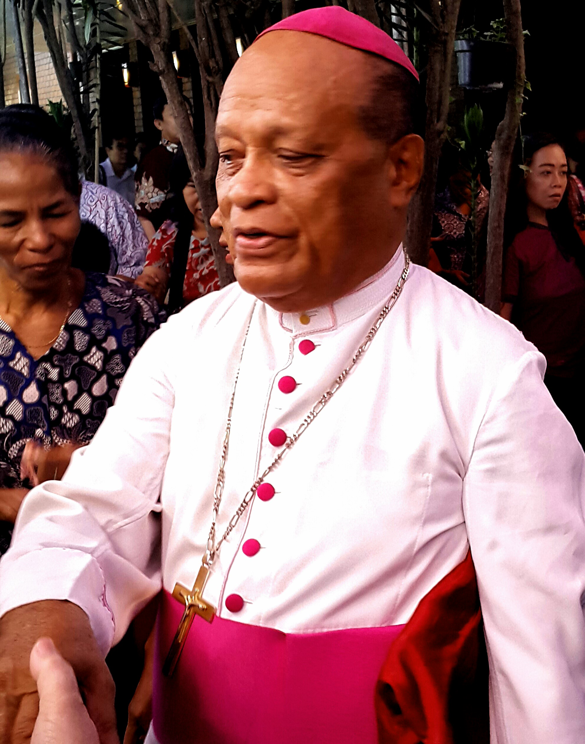 Mgr Fransiskus Kopong Kung, Uskup Larantuka